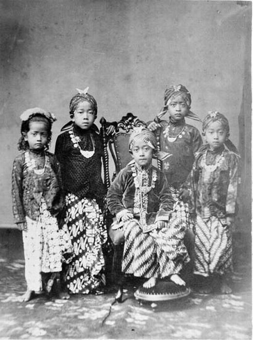 Foto. Nama kecil pangeran-pangeran dalam potret kelompok ini, berurutan dari kiri ke kanan: Gusti Raden Mas Soedjadi (kemudian berganti menjadi Poerbojo dan Sultan HB VIII), Gusti Raden Mas Poentoadji, Gusti Raden Mas Poetra, Gusti Raden Mas Soegiri, Bendara Raden Mas Soegirman. Nama mereka setelah dewasa adalah Bendara Pangeran Harjo Soerjodiningrat, Kanjeng Gusti Pangeran Hadipati Djoeminah, Sampejan Dalem Kanjeng Gusti Pangeran Adipati Anom Hamengkunegara, Gusti Pangeran Harjo Mangkukusumo, Ngarsa Dalem Sampejan Dalem Ingkang Sinuwun Kanjeng Sultan HB VIII. Pangeran dan Putri Kraton Yogyakarta